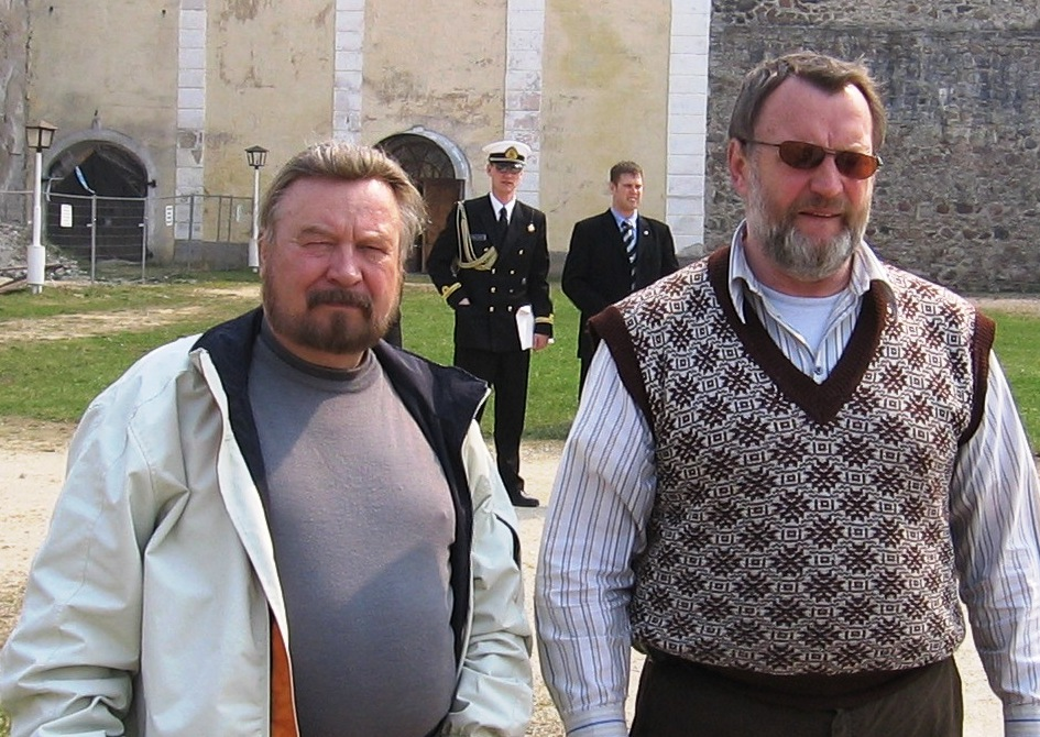 Ülo Nugis ja Ants Paju Põltsamaa lossihoovis